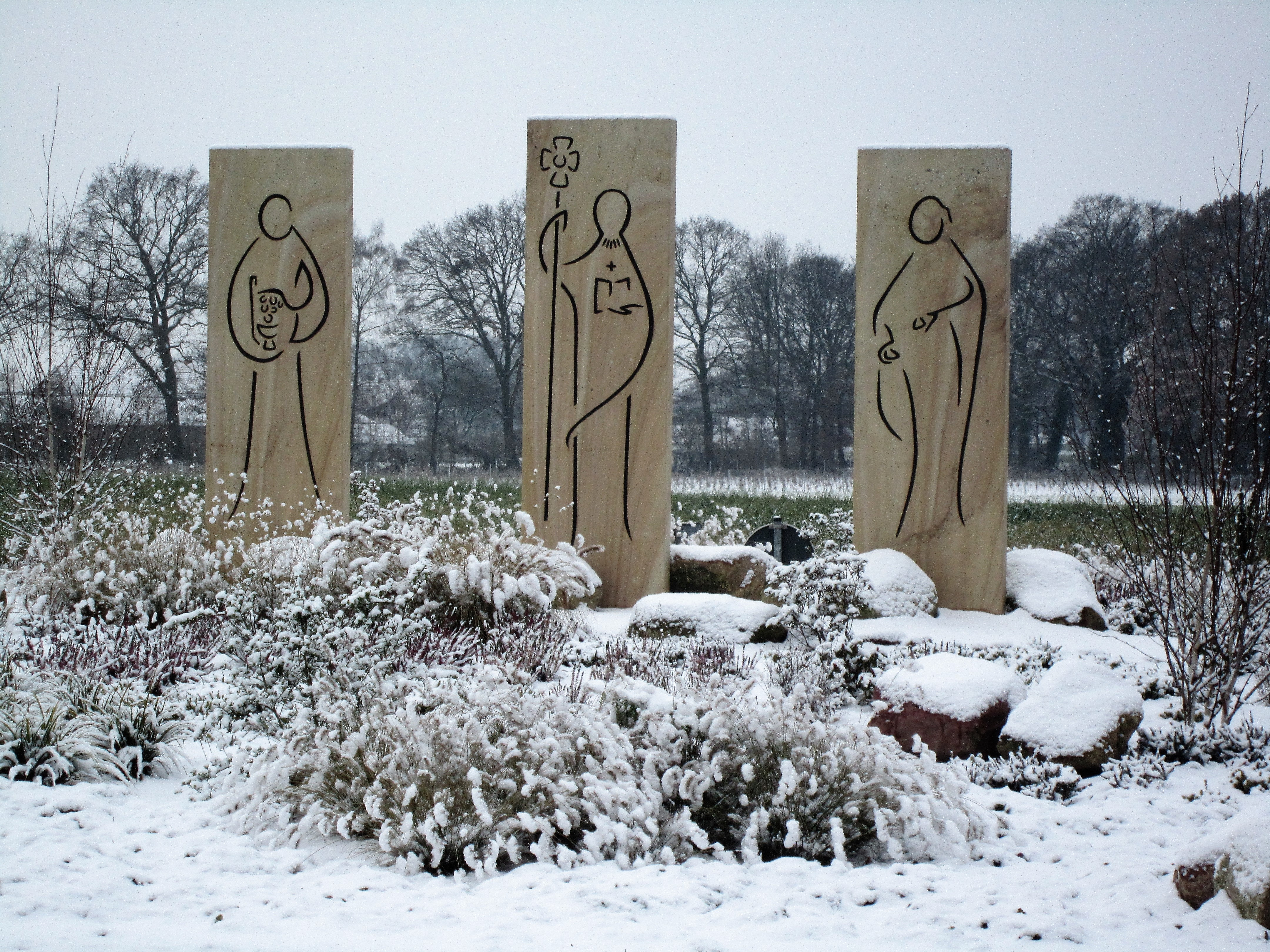 Drei Stelen auf dem Kreisel Döller Damm / Umgehungsstraße in Visbek, Abt Gerbert Castus und zwei Gefährten darstellend